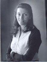 Ирина Геннадьевна Шевцова (род. 1983) — математик, доктор физико-математических наук, профессор кафедры математической статистики факультета ВМК МГУ.